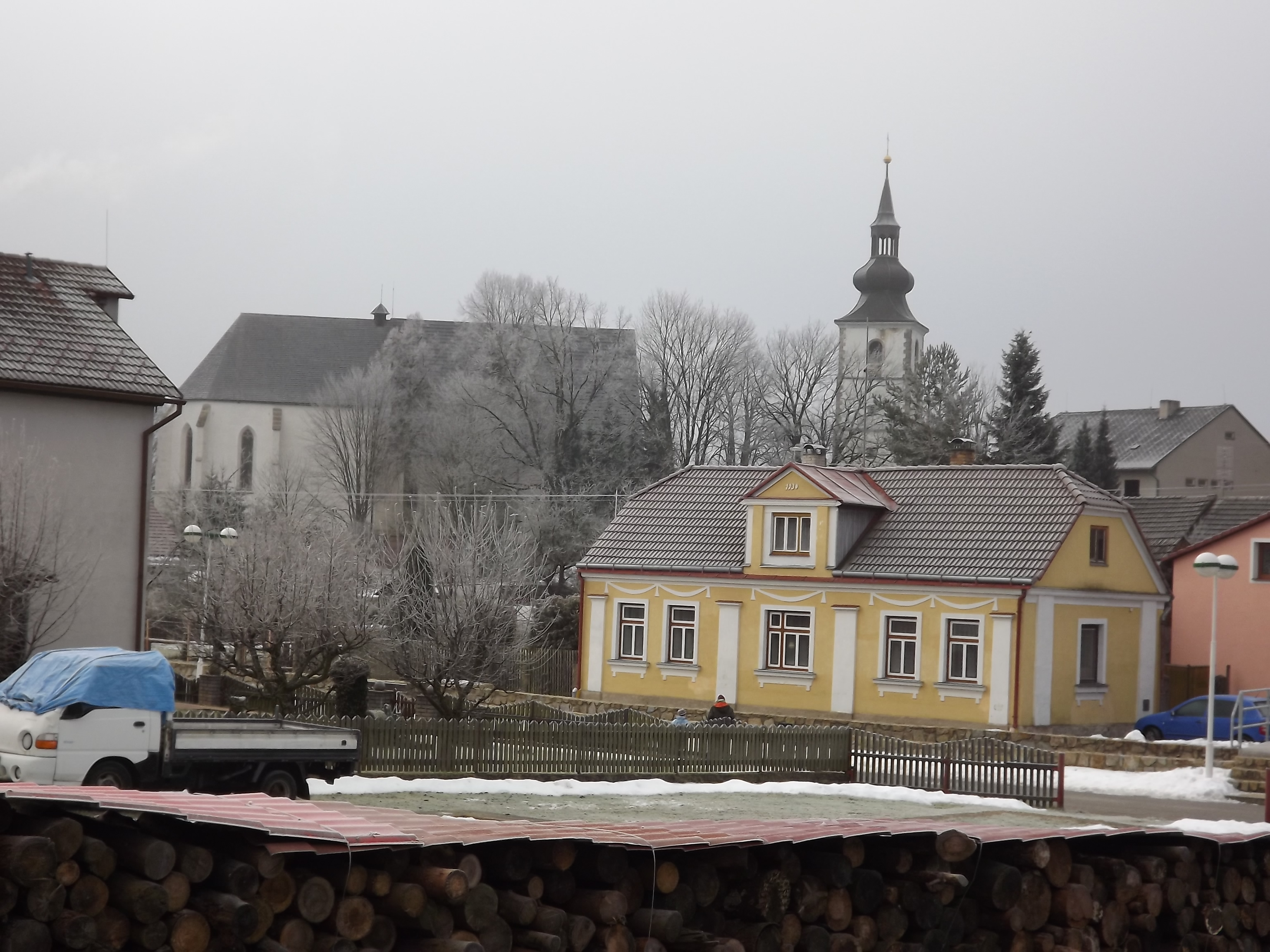 Kostel Nanebevzetí Panny Marie (Staré Město pod Landštejnem), ve středu obce na jih od náměstí, Staré Město pod Landštejnem